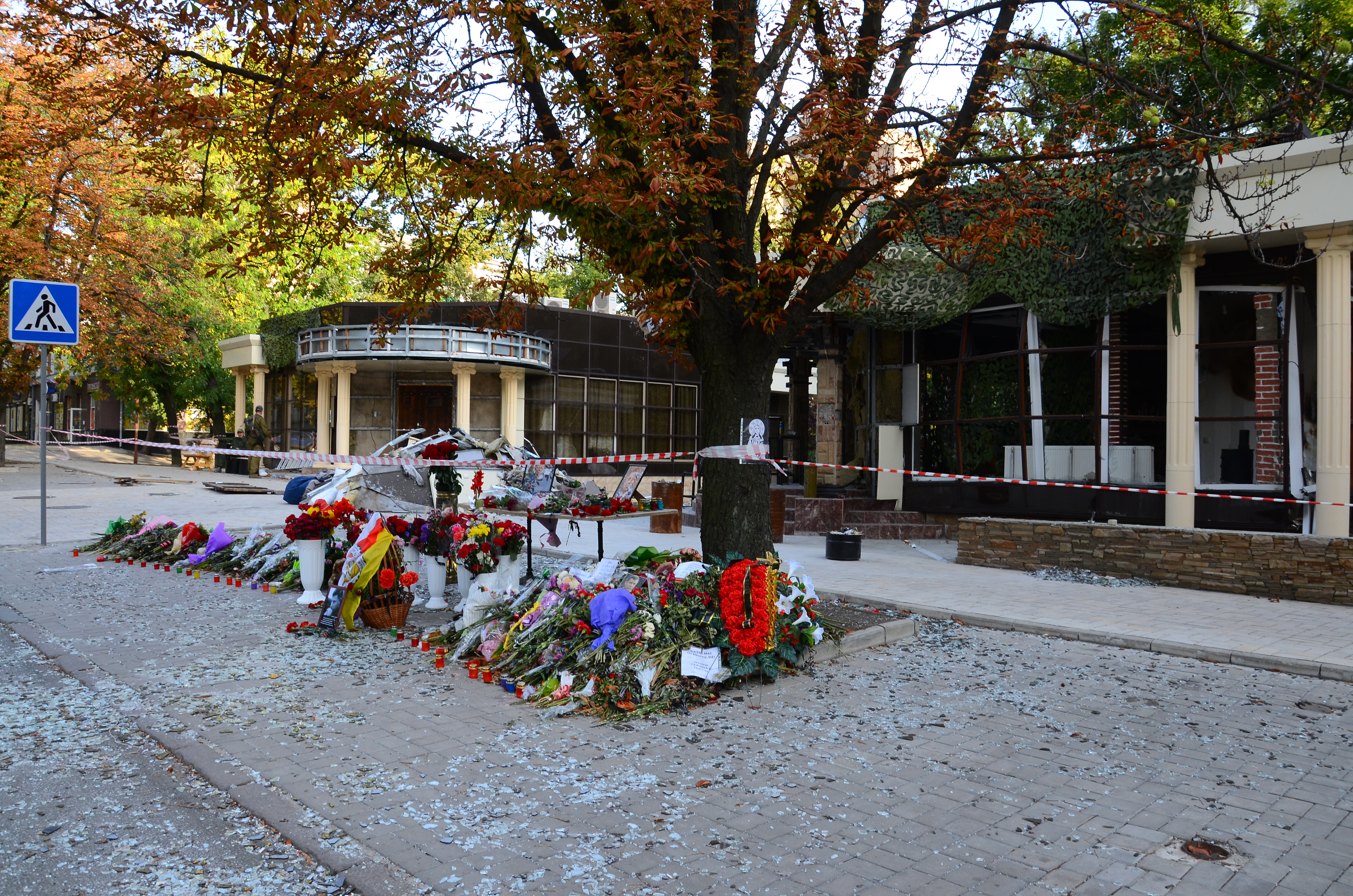 Кафе Сепар после взрыва